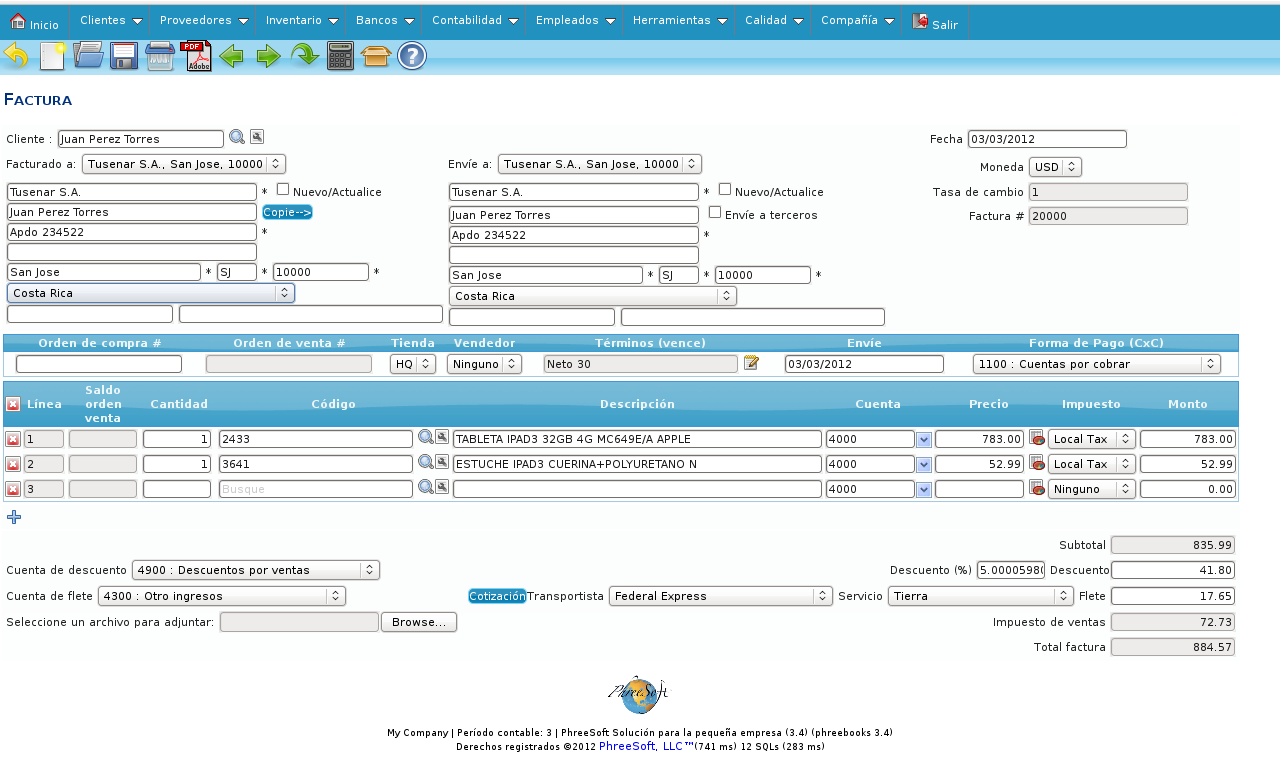 Factura de venta Phreedom Phreebooks